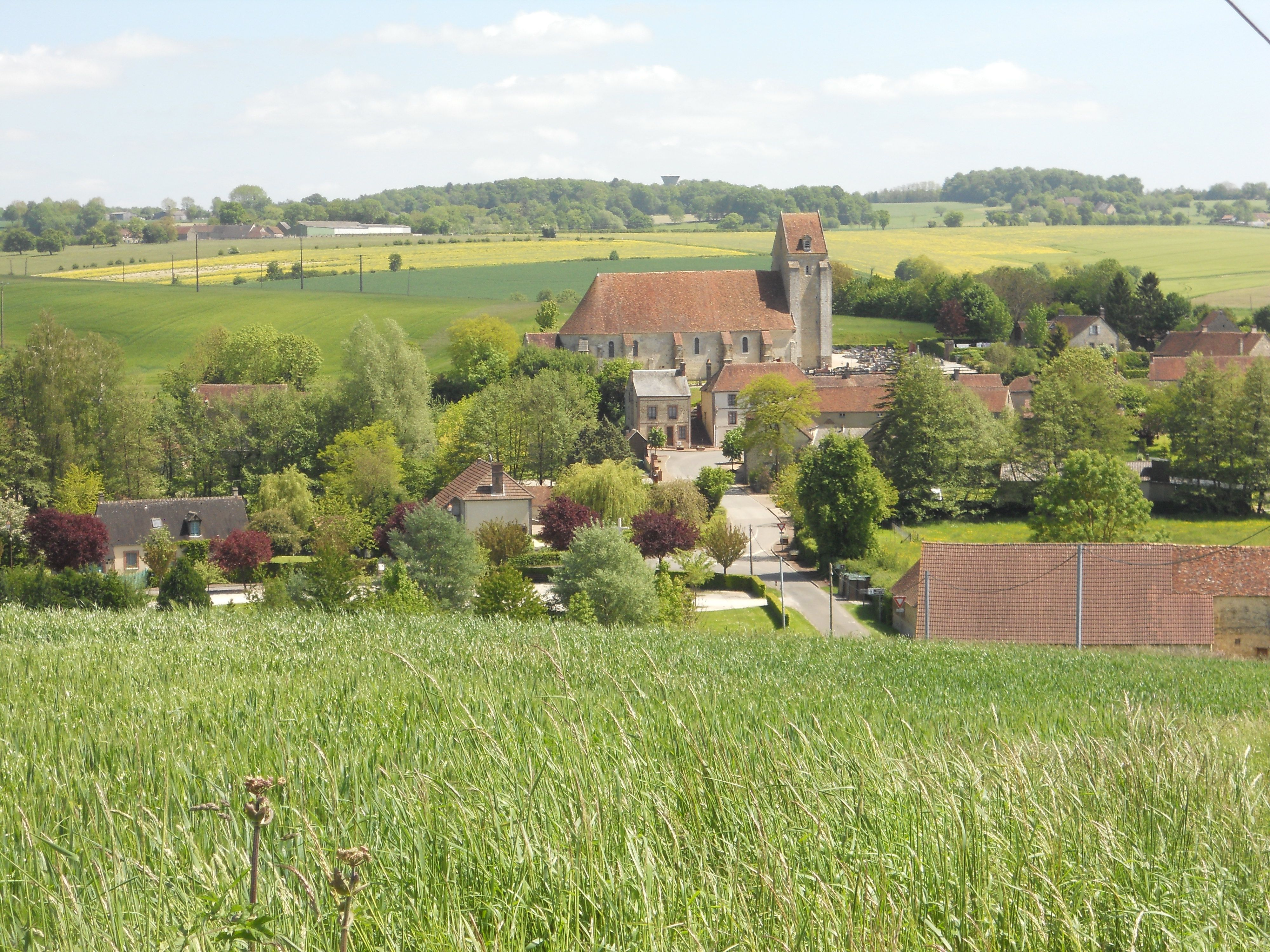 Le bourg de Sainte-Céronne-lès-Mortagne vu de la croix de l'Osier